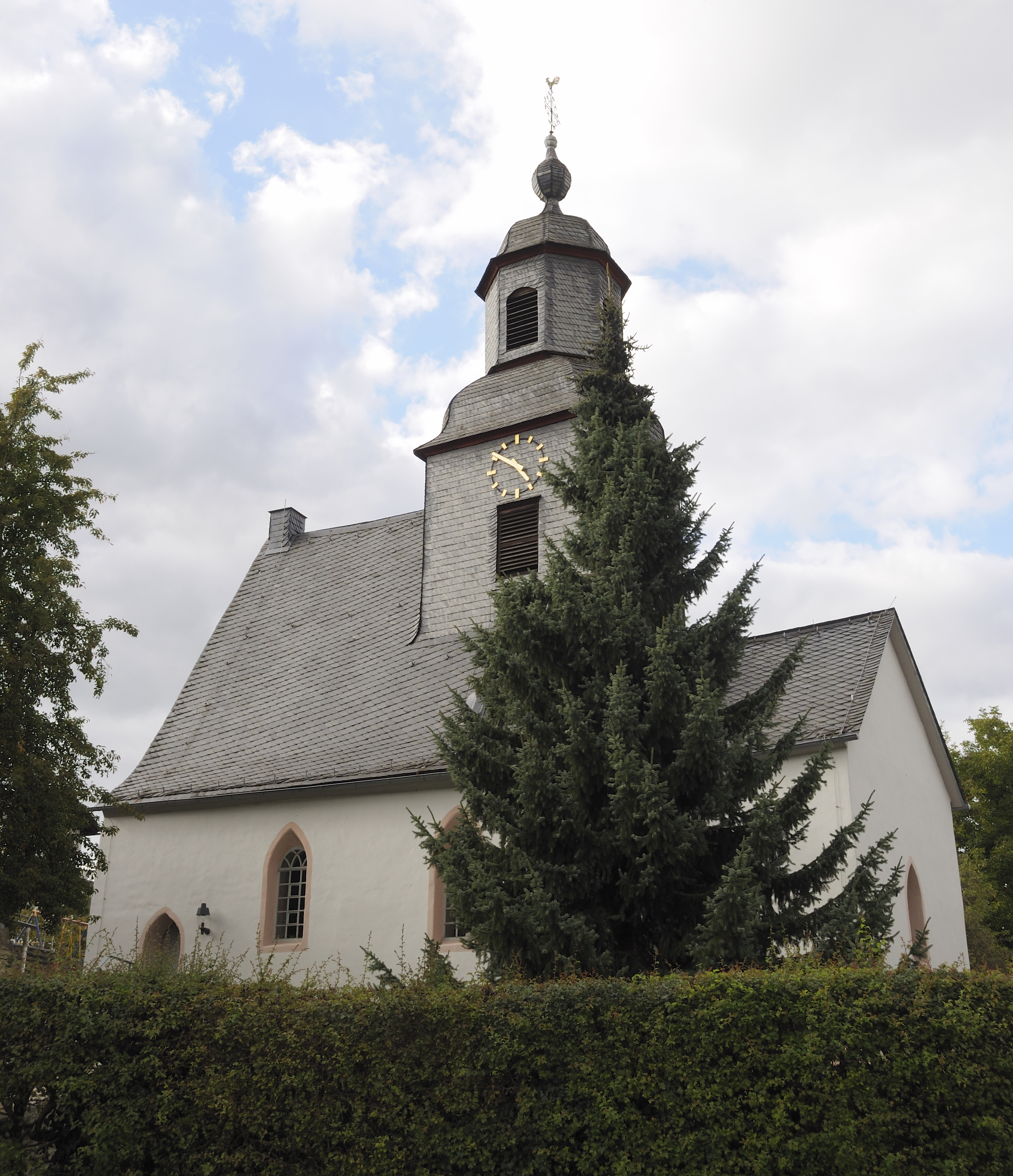 Dieses Foto entstand im Rahmen des Projekts Wiki Loves Monuments Mittelhessen, das aus dem Community-Projektbudget von Wikimedia Deutschland e. V. gefördert wurde.